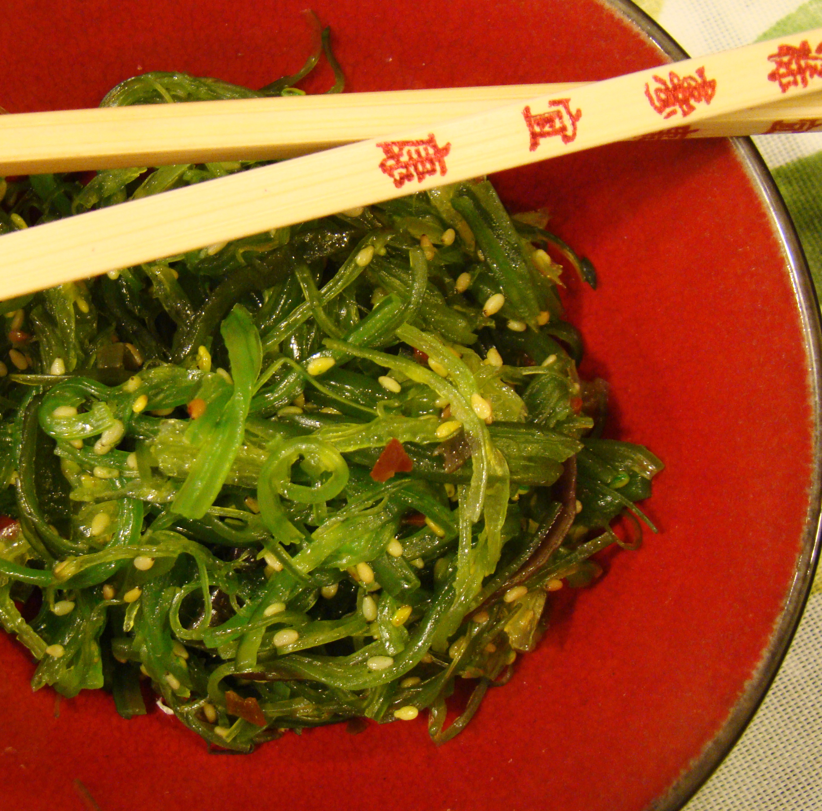 Seaweed Salad